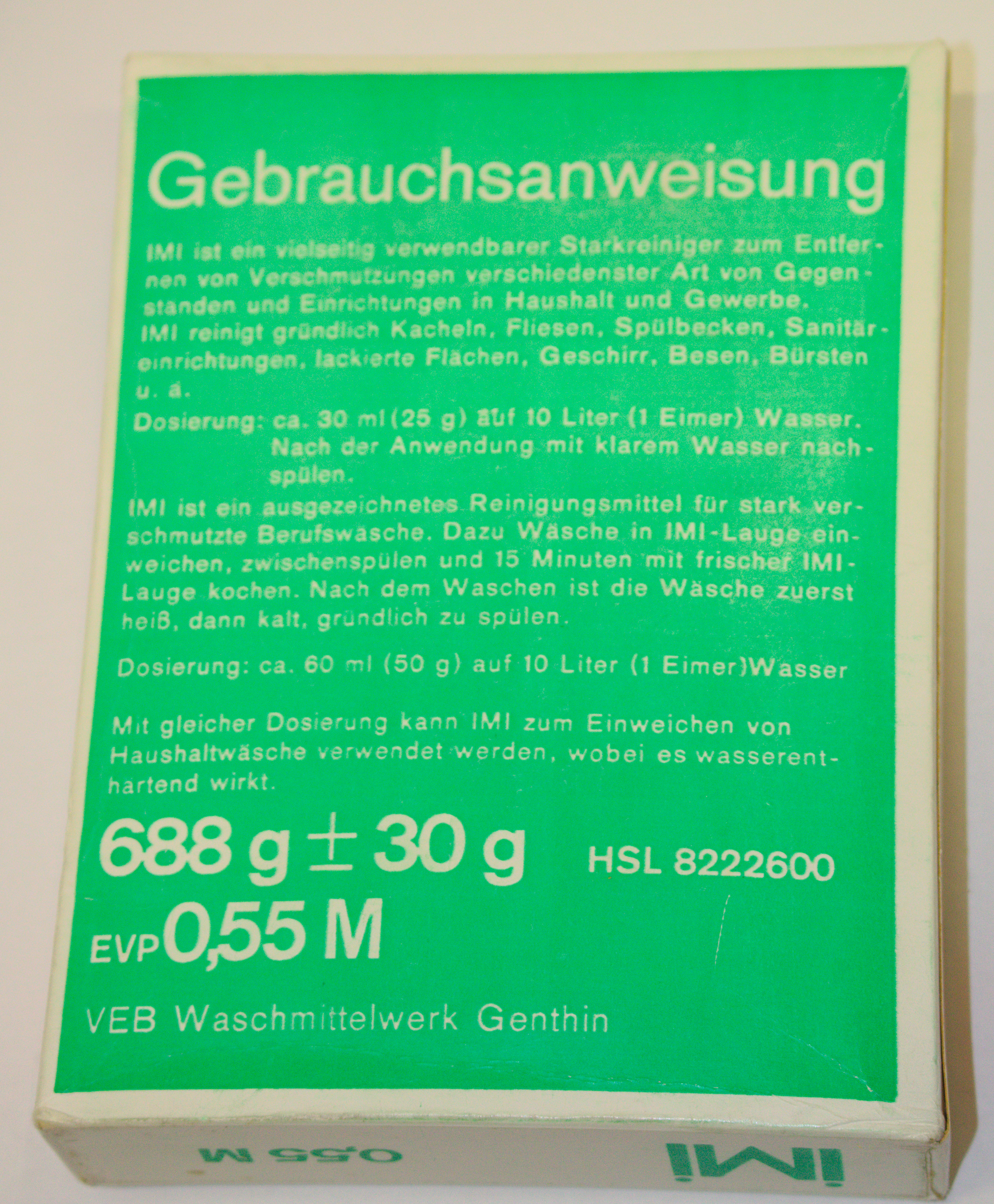 IMI-Starkreiniger-Verpackung, Rückseite